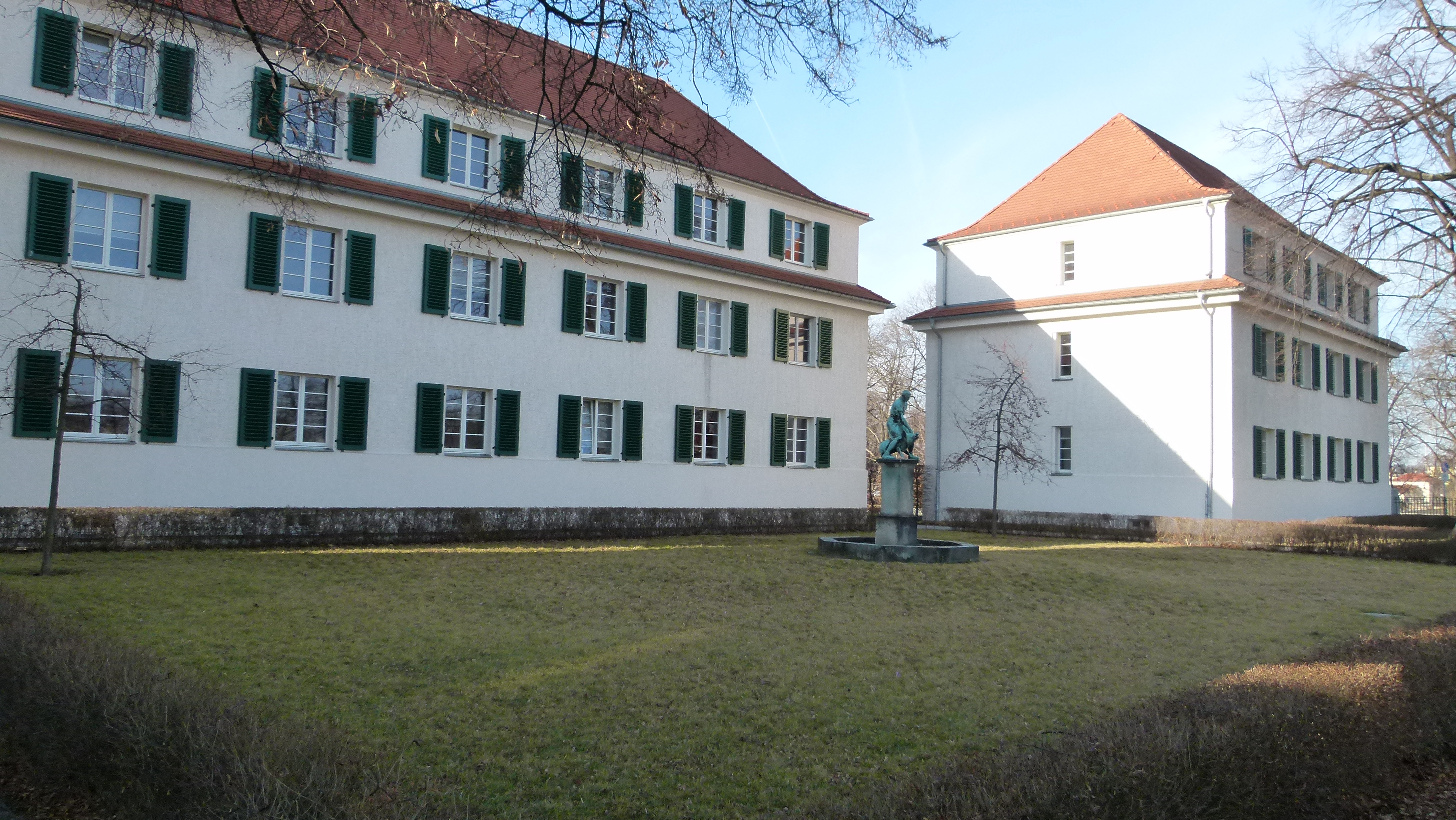 Denkmalgeschützte Häuser, Messering 25-26, Friedrichstadt, Dresden